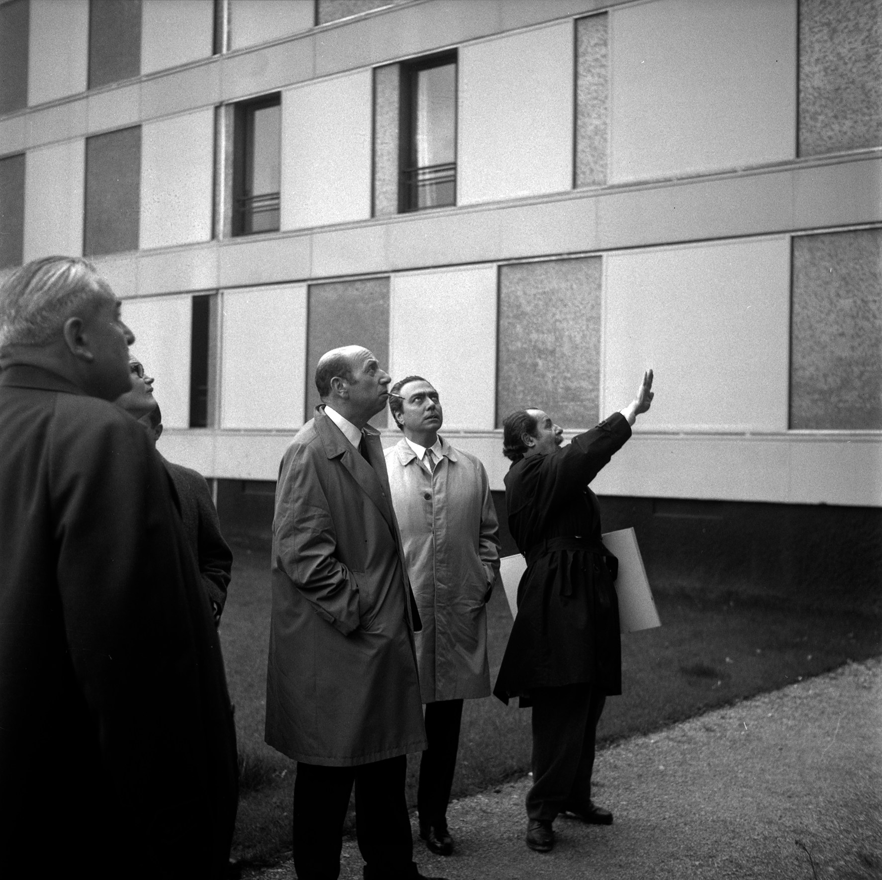 Quartier du Mirail. Le 25 Mars 1968. Vue de Georges Candilis, architecte, expliquant son projet à un groupe d'homme dont le maire Louis Bazerque, à gauche, dans la ZUP du Mirail.